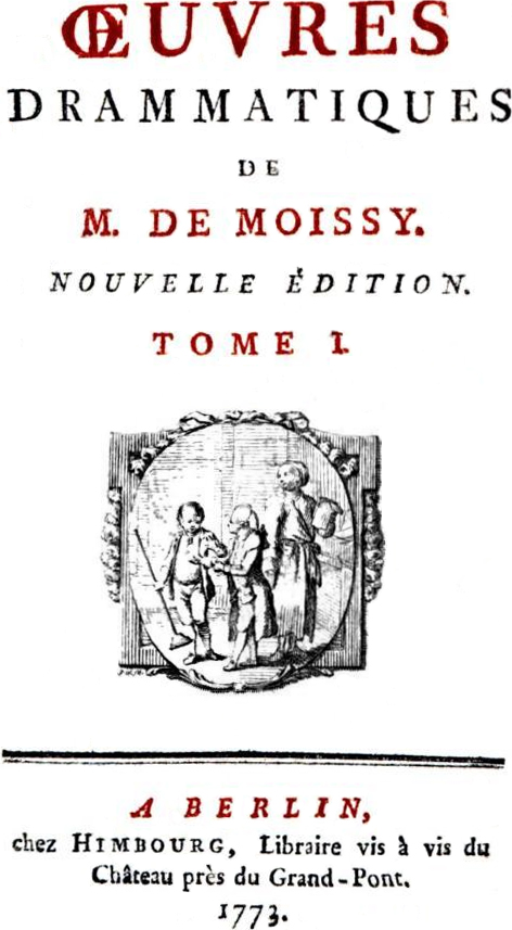 Front page of Œuvres drammatiques, vol. i, by Alexandre Guillaume Mauslier de Moissy (1712-1777)